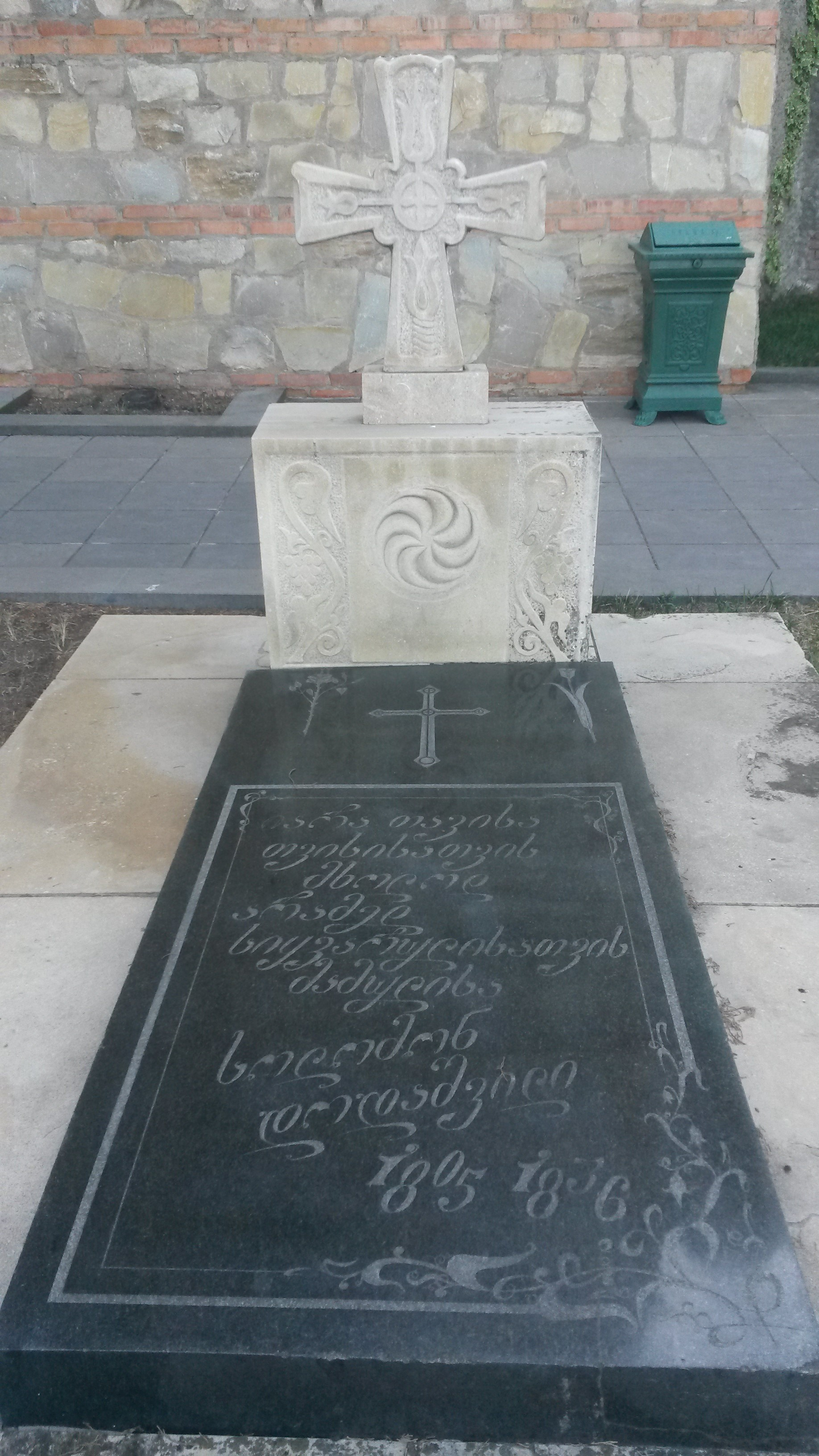 მთაწმინდის პანთეონი